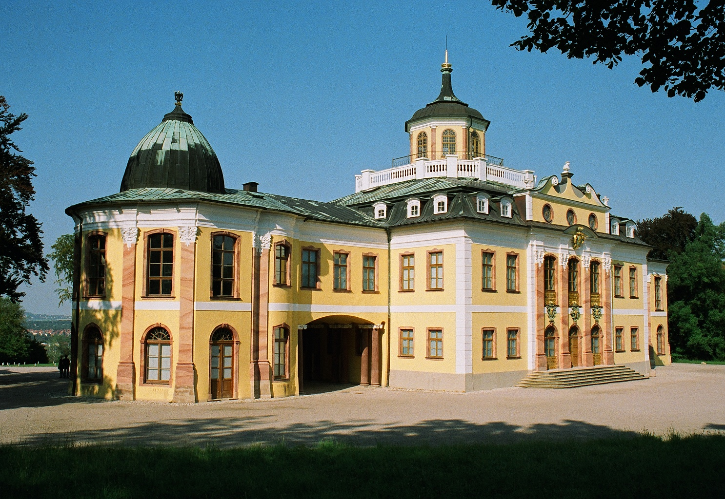 Schloß Belvedere liegt etwa 3 km südlich der Stadt Weimar. Das Schloß steht auf einem Höhenrücken, von dem sich eine schöne Aussicht auf die Stadt bietet. Im Inneren besticht besonders die Stuckdekoration. Im Erdgeschoß werden ostasiatische Keramiken gezeigt, Fayencen aus Thüringen und Süddeutschland, ferner Pläne der Schloß-, Garten- und Parkanlagen. Die Porzellansammlung im ersten Obergeschoß gibt einen Überblick über die Entwicklung des europäischen Porzellans in der ersten Hälfte des 18.Jhds. Schloß Belvedere ist umgeben von einem Landschaftspark im englischen Stil. Zum Park gehört eine Orangerie, welche sich zu einer der reichhaltigsten Pflanzensammlungen Europas entwickelte. Im Sommer kann der Besucher neben Palmen, Zedern und Agaven im Freien auch Orangen-, Feigen-, Granatapfel- und Johannesbrotbäumen, kanarische Drachen- und südostasiatische Gummibäume sehen. Herzogin Maria Pawlowna fügte dem noch einen "Russischen Garten" hinzu. Dieser Garten sowie der sich daran anschließende Irrgarten bieten Beispiele des strengen französischen Stils. Im Heckentheater, typisch für die rokokohafte Parkarchitektur, werden Kammerspiele und Konzerte aufgeführt.